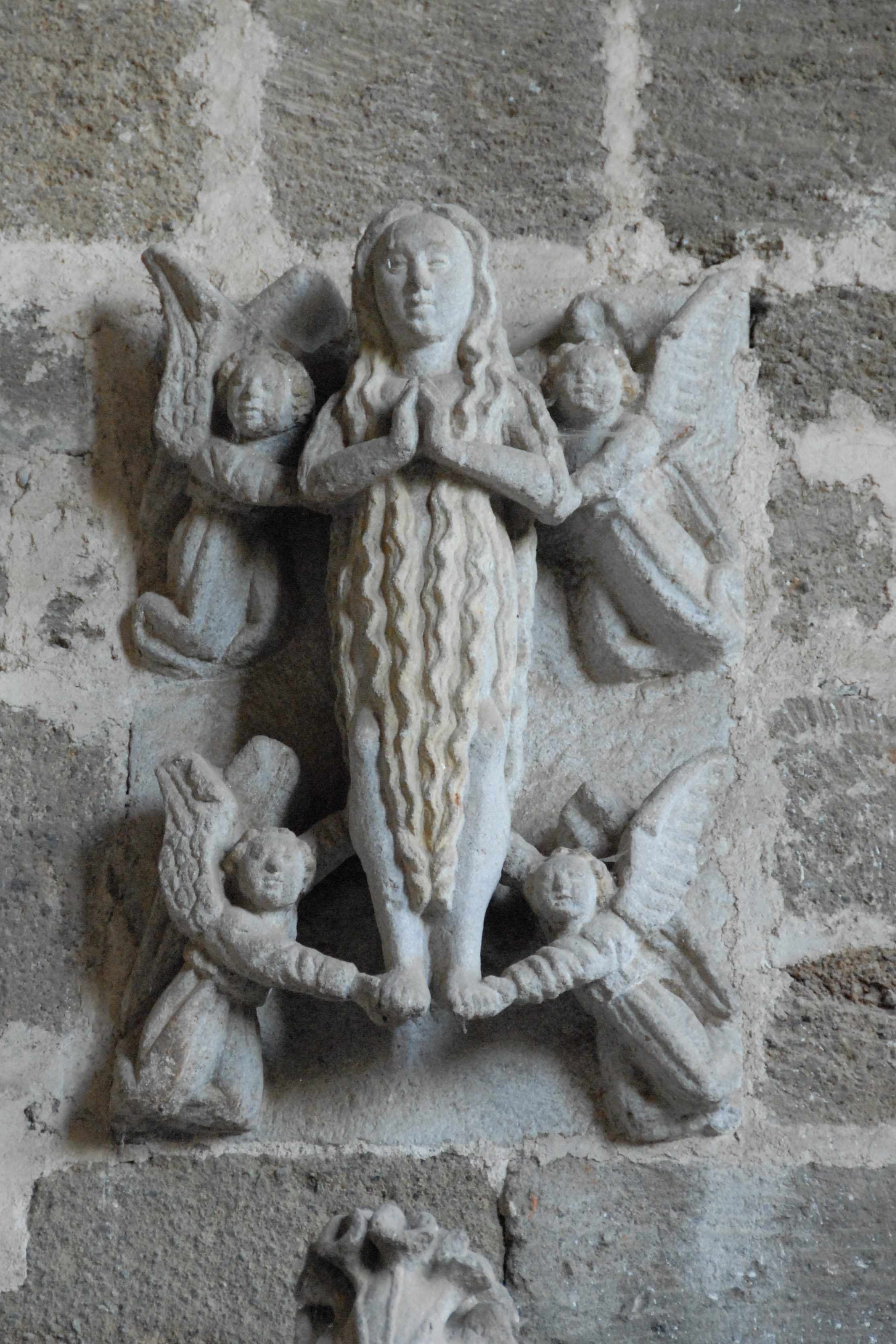 Mary Magdalene